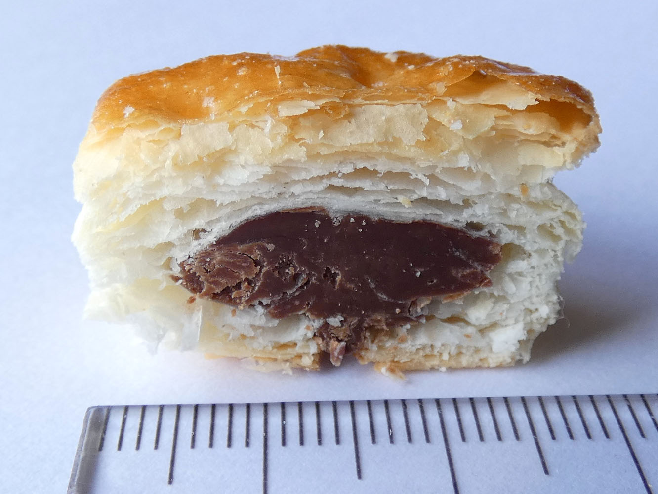 ロッテの「パイの実」の断面